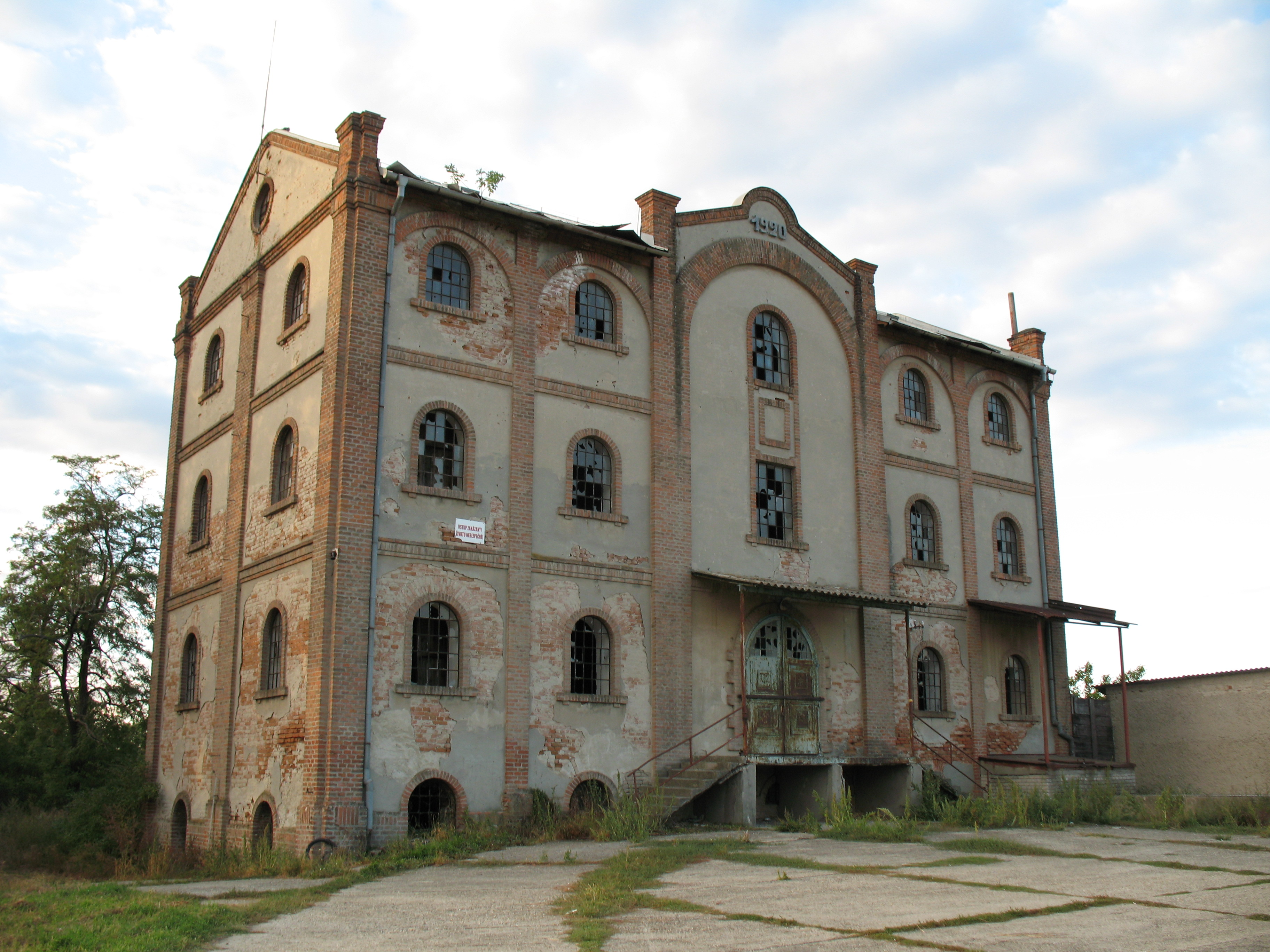 Vágfarkasdi műmalom 1